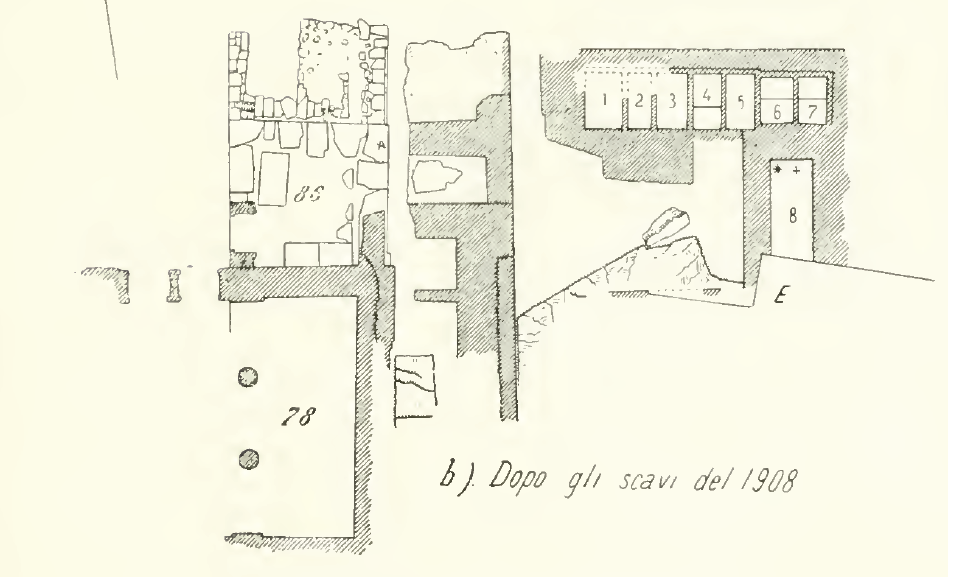 secteur nord-est du Palais de Phaistos, après les fouilles de 1908 pendant lesquelles fut découvert le disque de Phaistos.